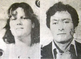 Antonella Migliorini e Paolo Mainardi - le vittime del quinto delitto del cosiddetto Mostro di Firenze, uccisi il 19 giugno 1982 a Baccaiano.